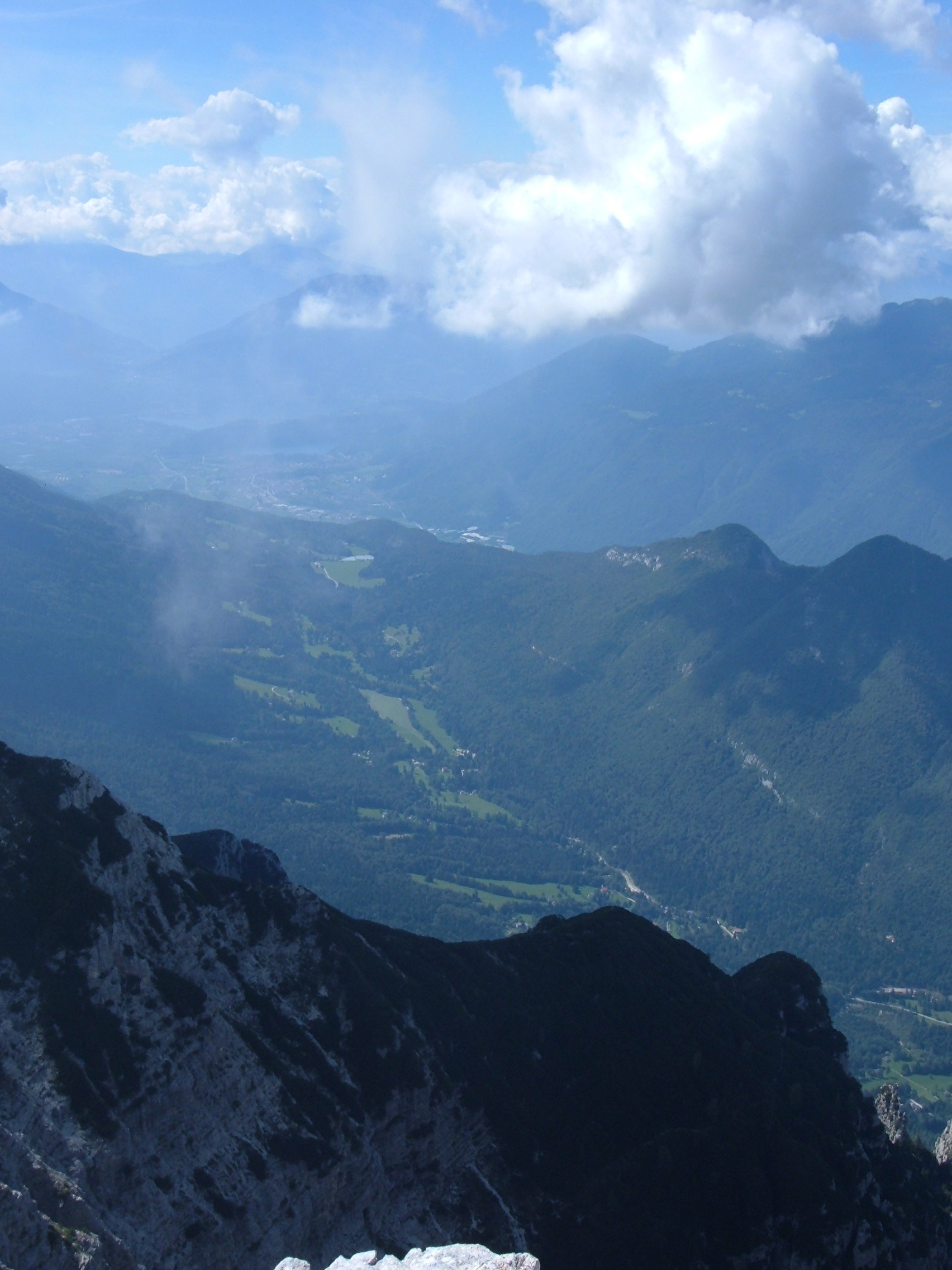 Valle di Sella, Trentino, Italy